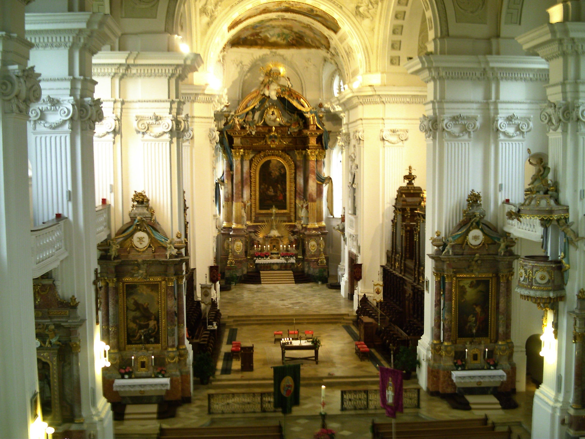 Innenansicht der röm.-kath. Pfarrkirche St. Verena, zugehörig zur ehemaligen Reichsabtei der Prämonstratenser in 88430 Rot a. d. Rot. Aufgenommen vom Chor aus. Datum der Fotos: 2006/06/04